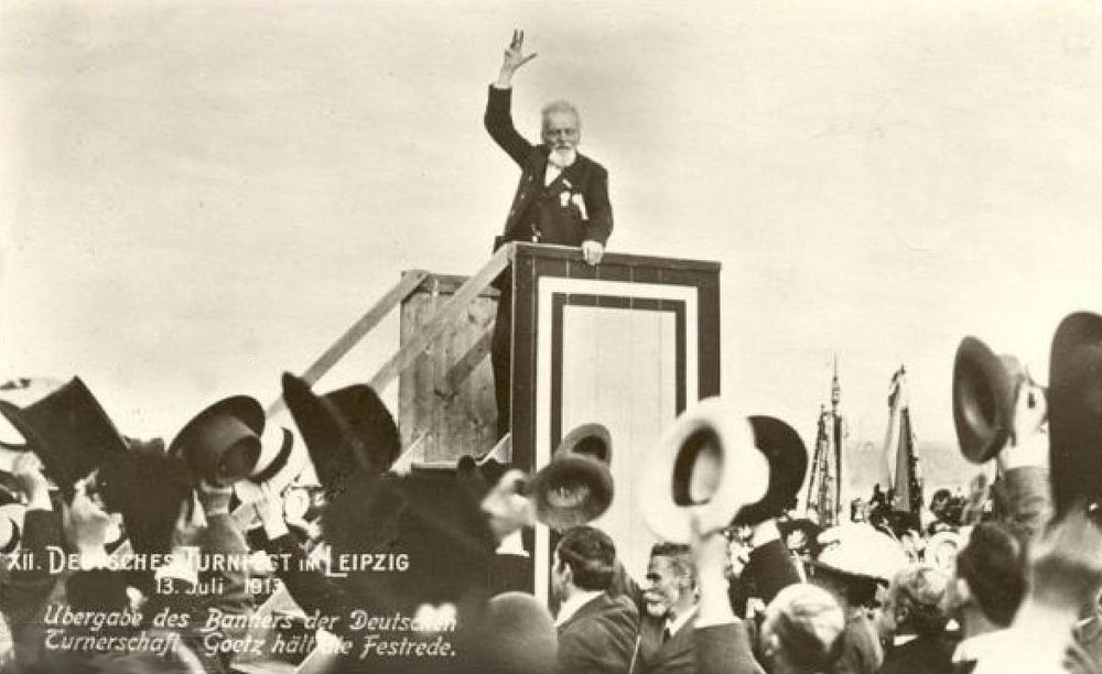 Der 87-jährige Ferdinand Goetz hält die Festrede auf dem XII. Deutschen Turnfest in Leipzig 1913